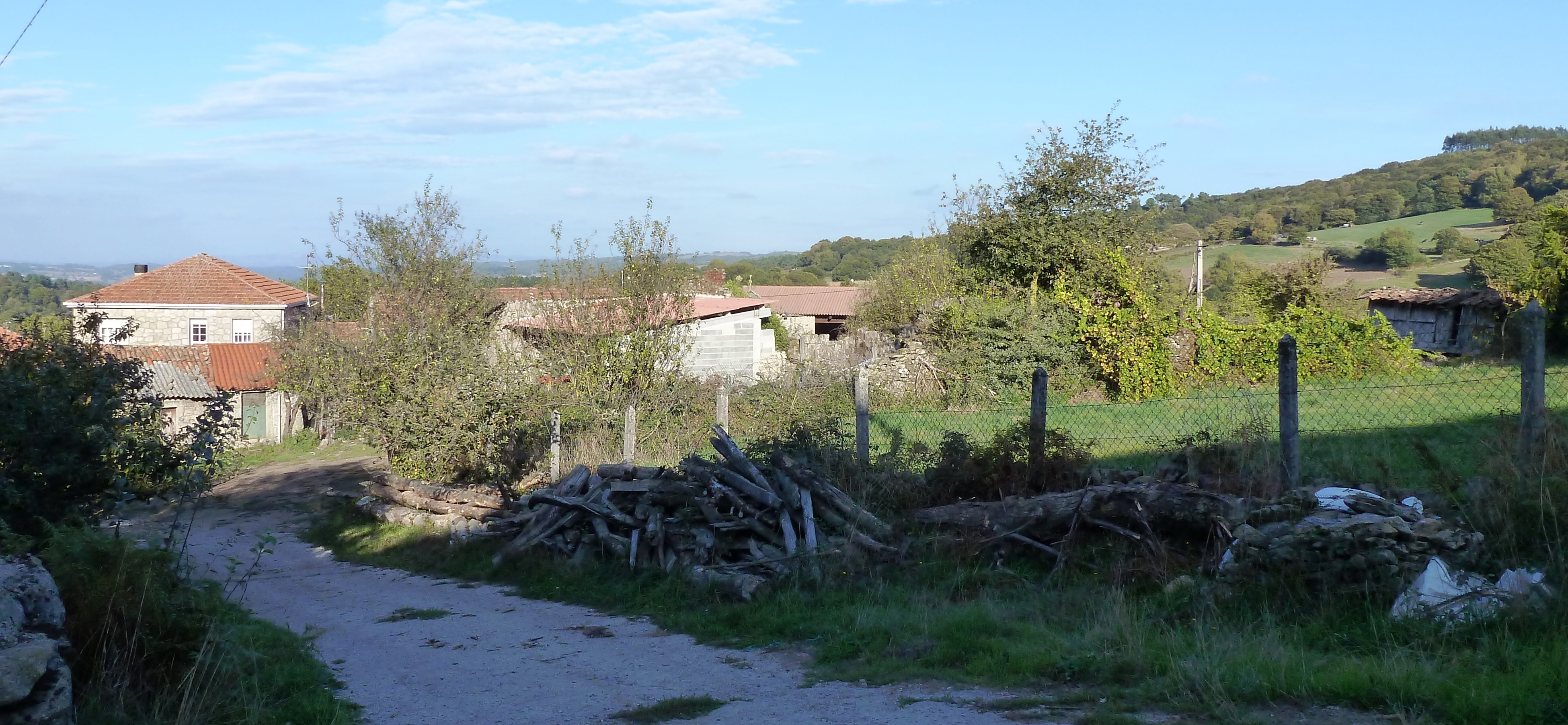 Cas de Pedro, Santa Cristina, Carballedo